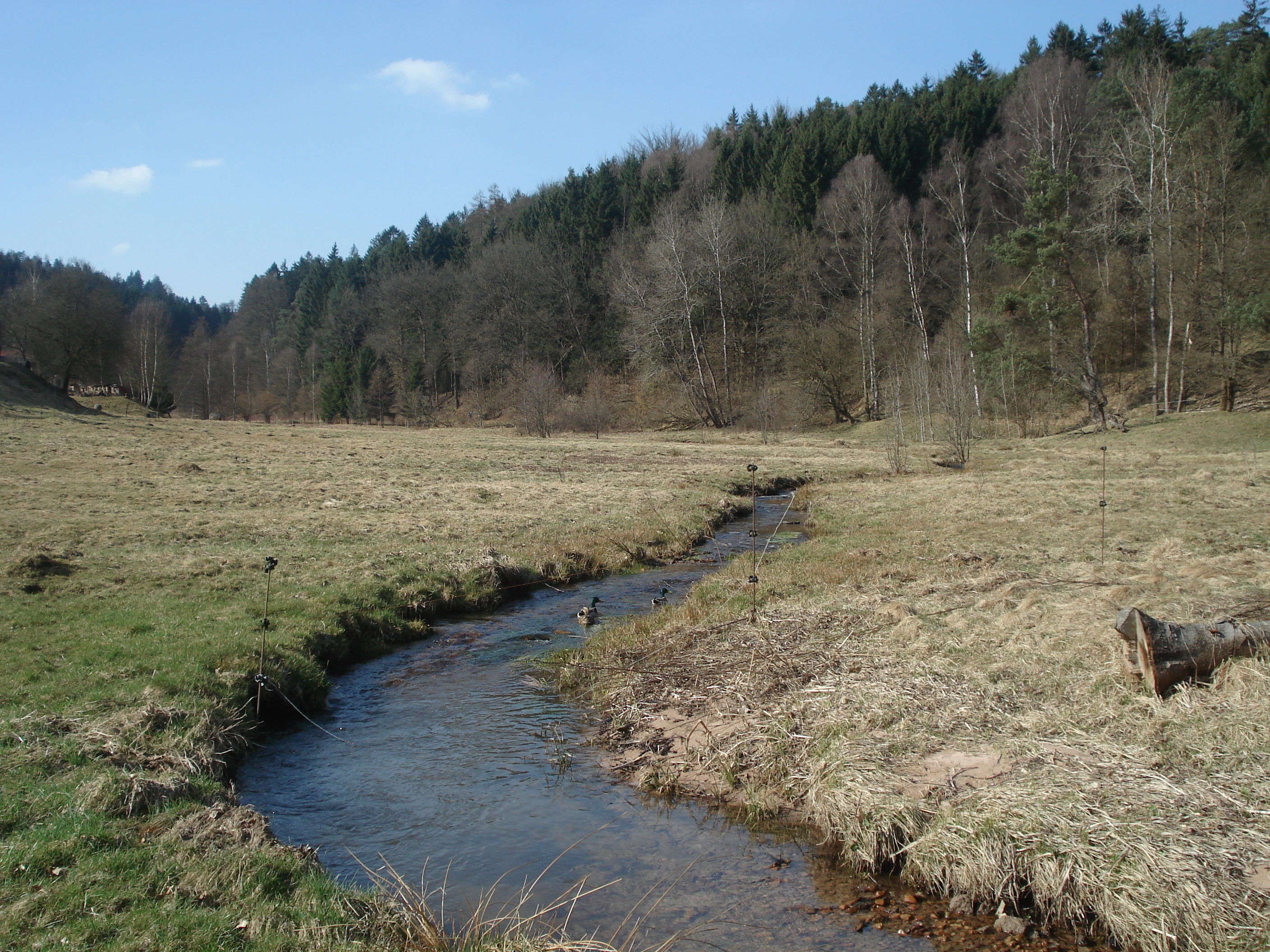 Der Laubersbach vor Frammersbach